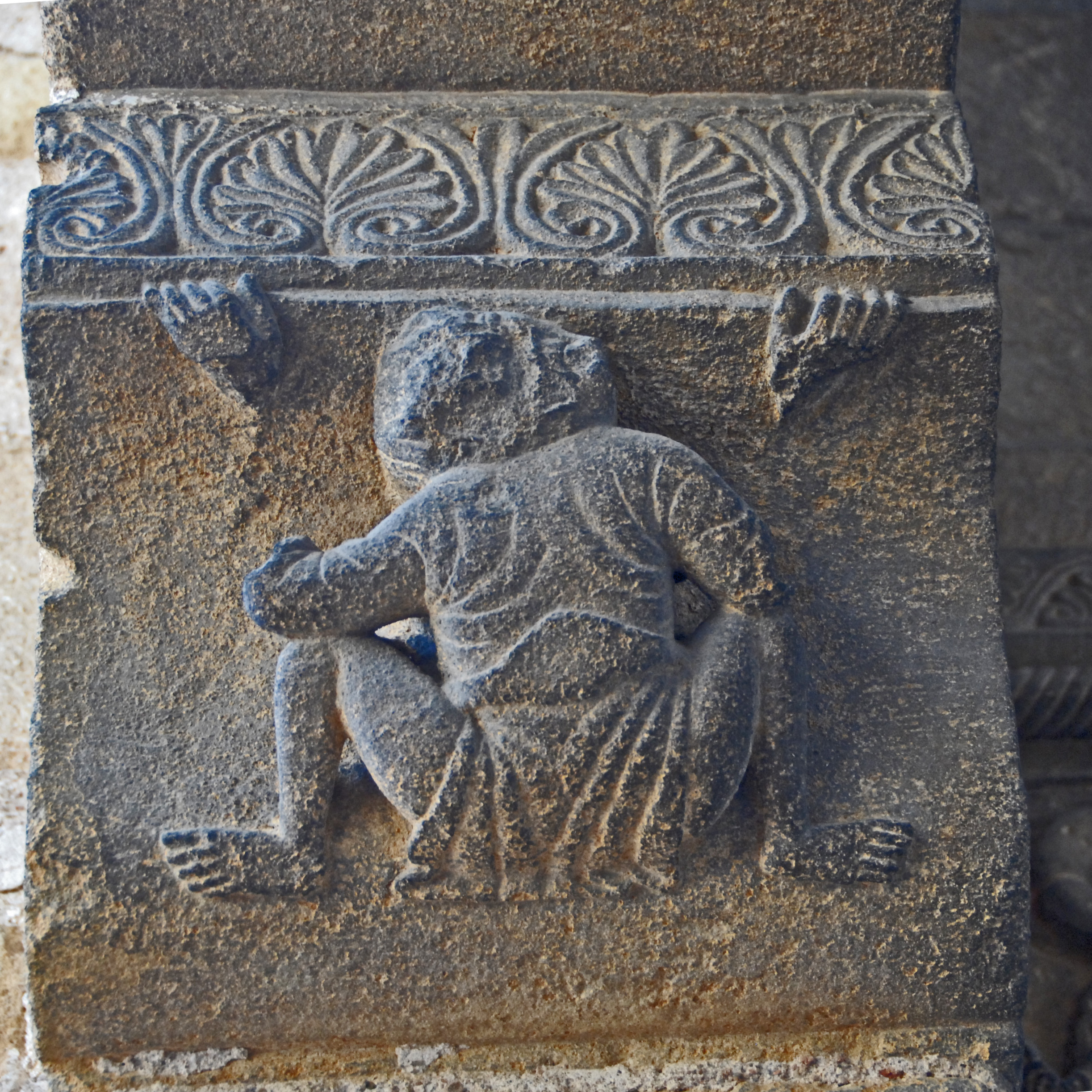 Narthex EG, Inneres, Westportal, Kapitell